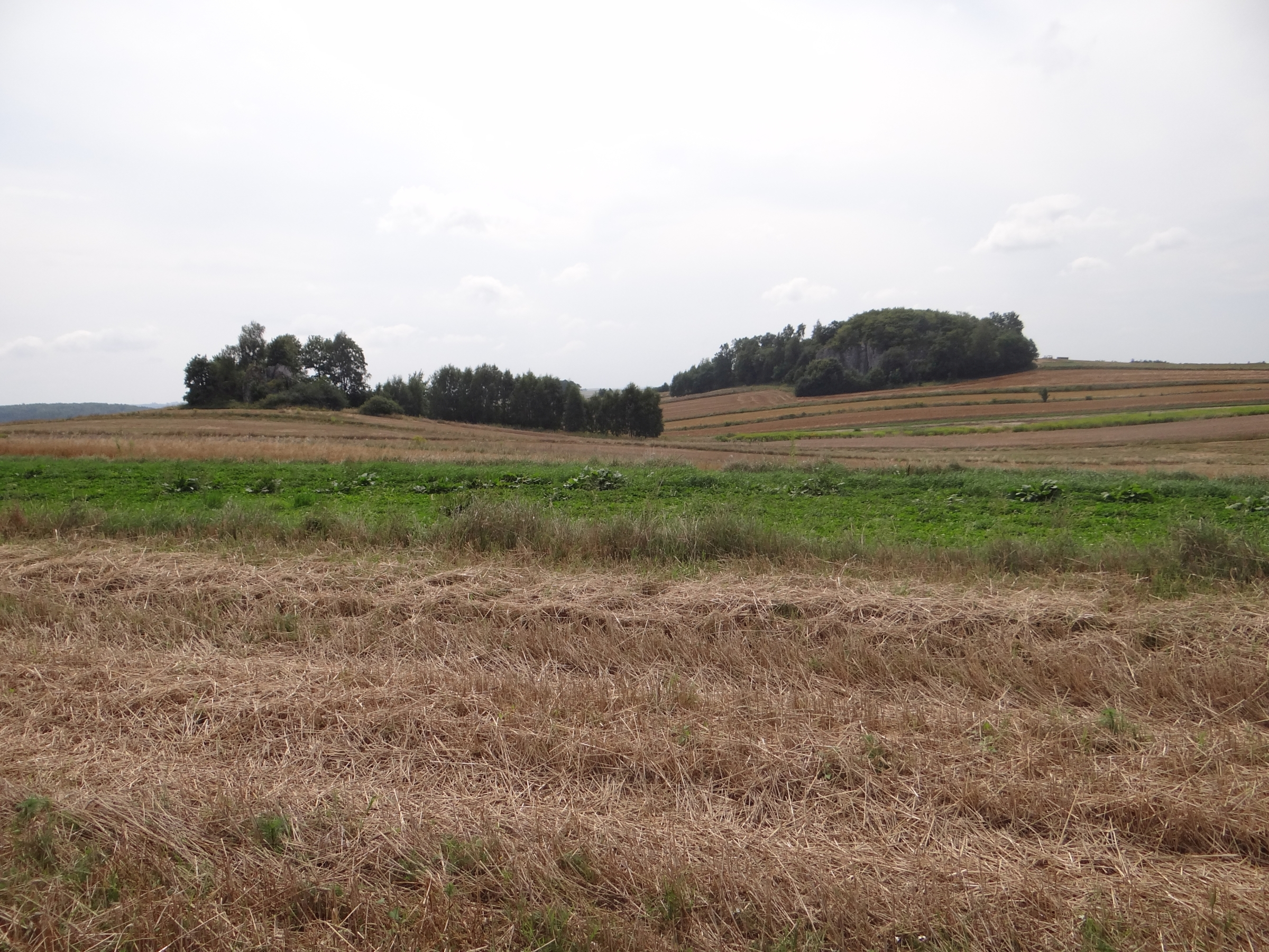 Skała Ścianki w miejscowości Strzegowa (województwo małopolskie)